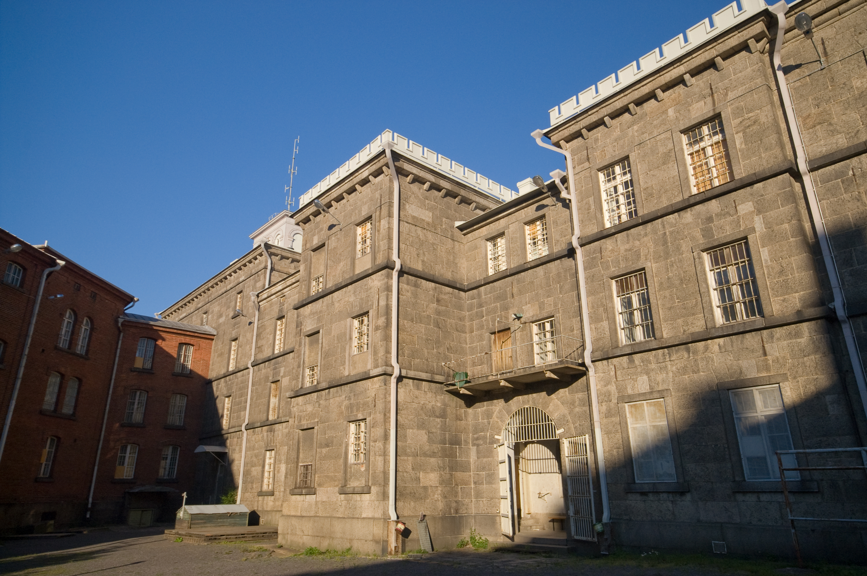 Kakola